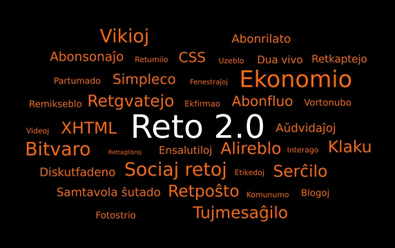 Vortonubo, inspirita per la anglalingva bildo File:Web 2.0 Map.svg.